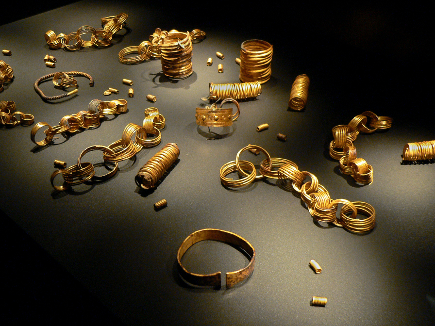 Goldhort von Gessel, Aufnahme bei der Pressekonferenz zur Eröffnung der Ausstellung im Niedersächsischen Landesmuseum Hannover zur Schau Im Goldenen Schnitt - Niedersachsens längste Ausgrabung